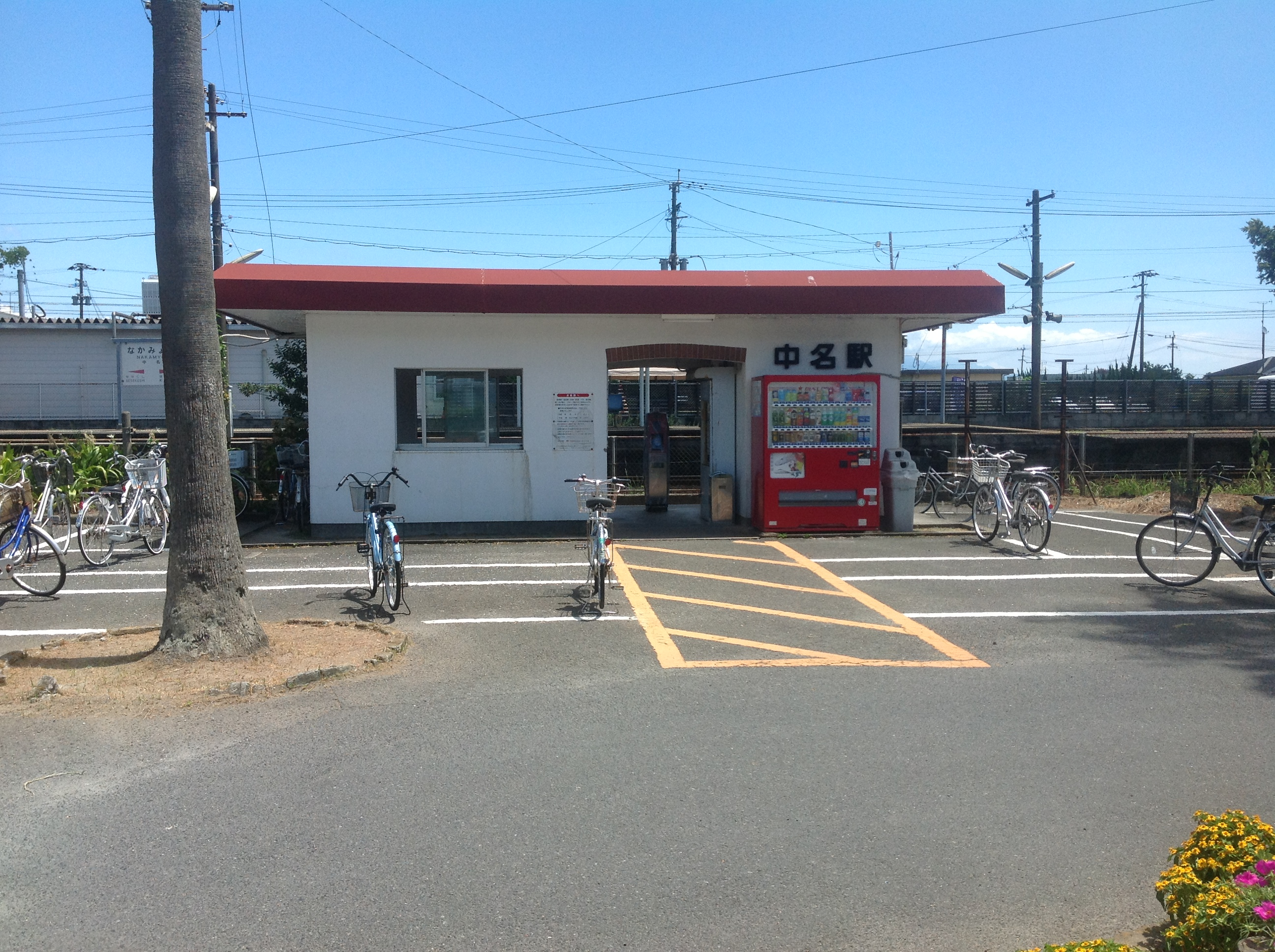 中名駅駅舎